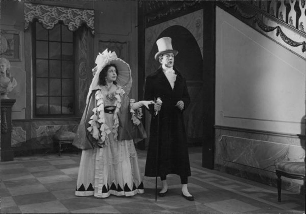 Ellen Hartman och Torsten Hammarén. Pressbild tagen vid inspelningen av filmen Gösta Berlings saga (1924).